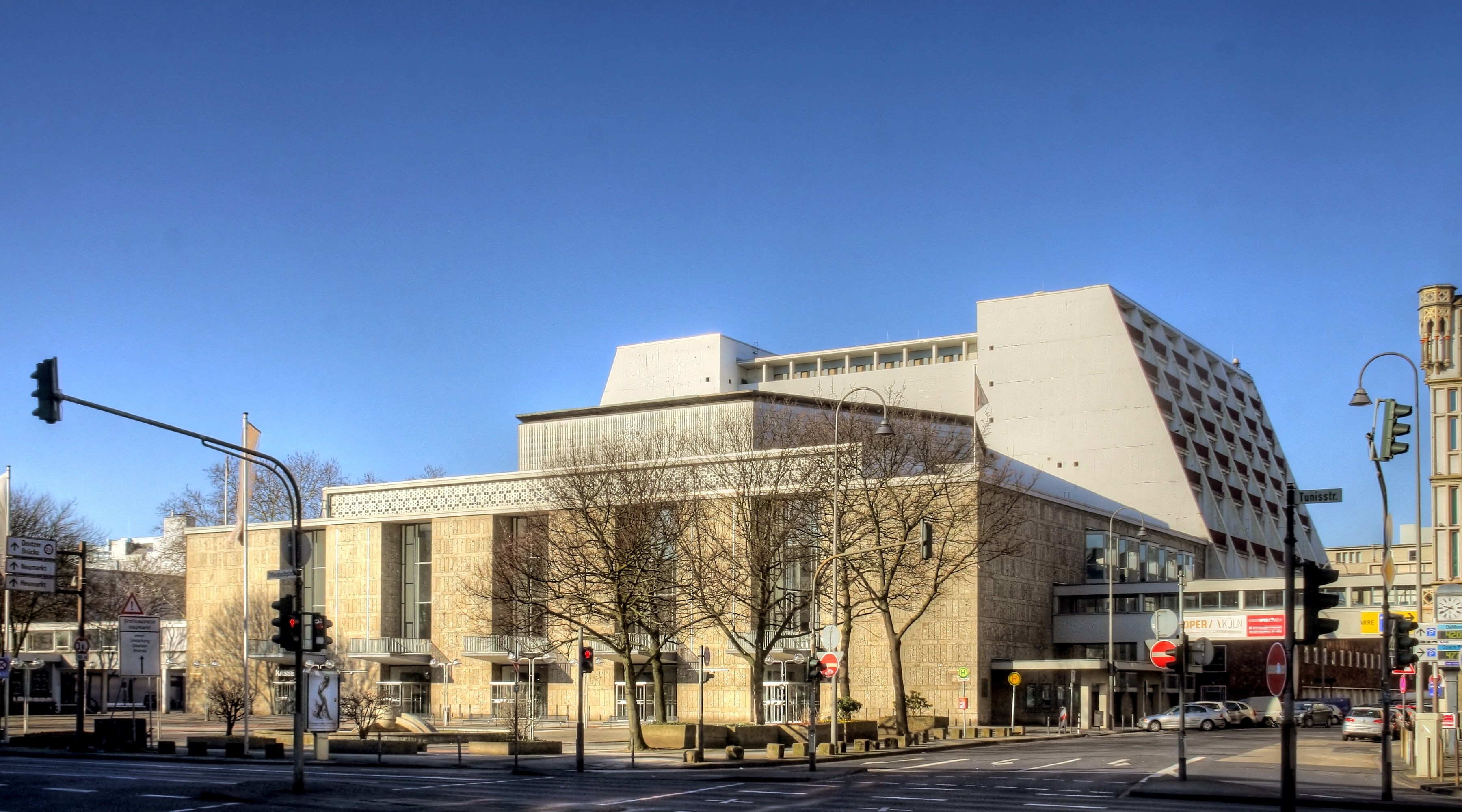 Oper Köln. Architekt: Wilhelm Riphahn